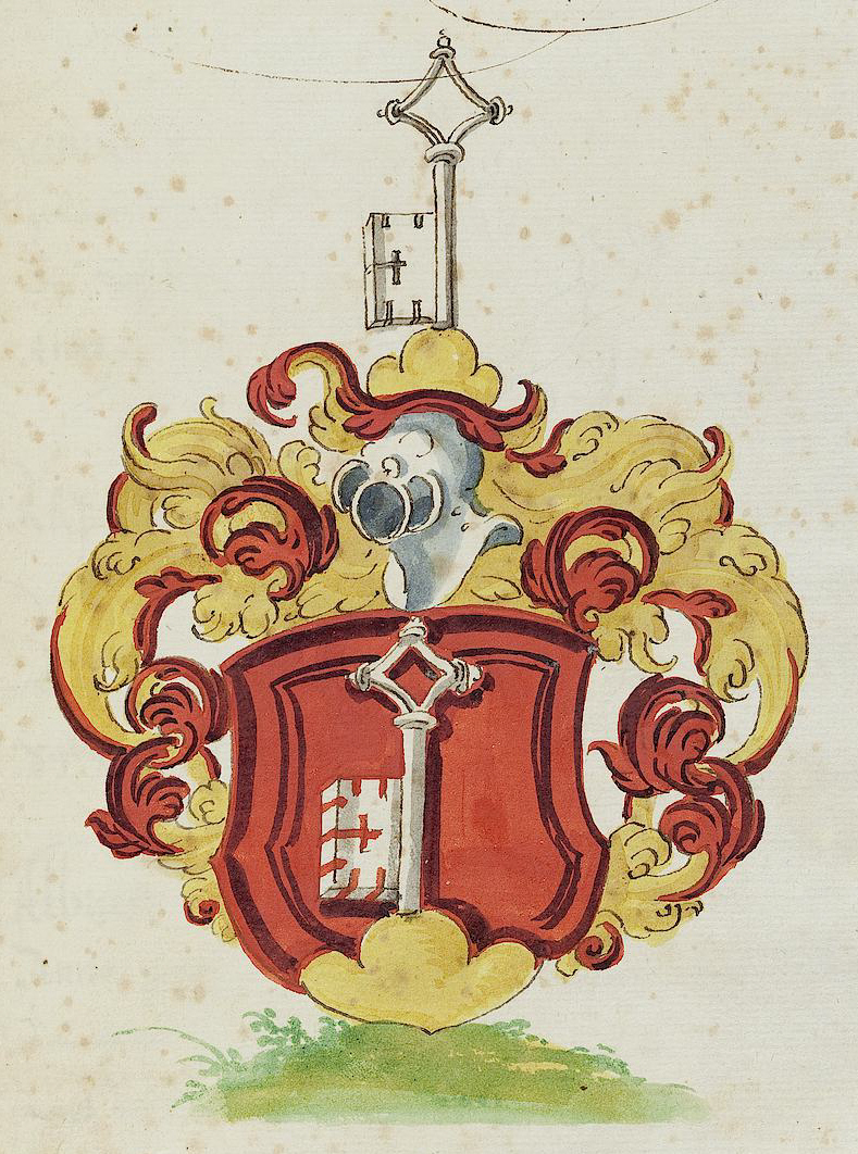 Wappen aus: David Wolleber: Chorographia Württemberg, [Schorndorf] 1591, Universitätsbibliothek Tübingen, Mh 6,1 Wappen der Grafen von Schlüsselberg